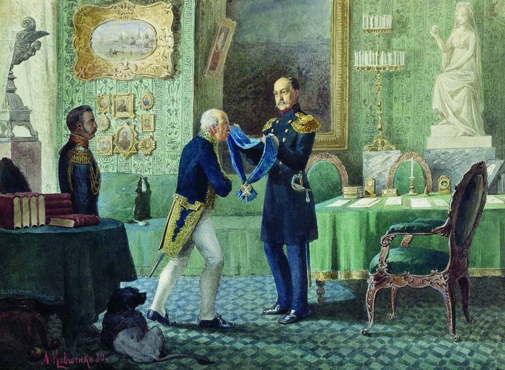 Картина русского художника Алексея Кившенко: «Император Николай I награждает Сперанского за составление свода законов. Начало 19 в.». На картине император Николай Павлович награждает Сперанского орденом Андрея Первозванного